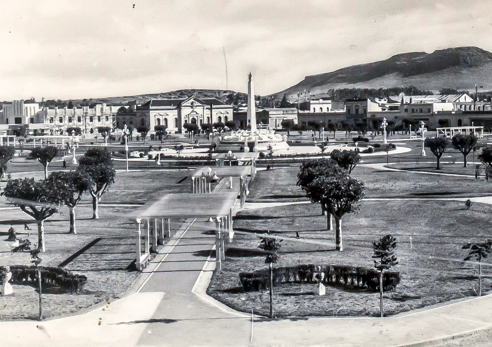 Vista general de Plaza Libertad de la ciudad de Balcarce en al año 1937